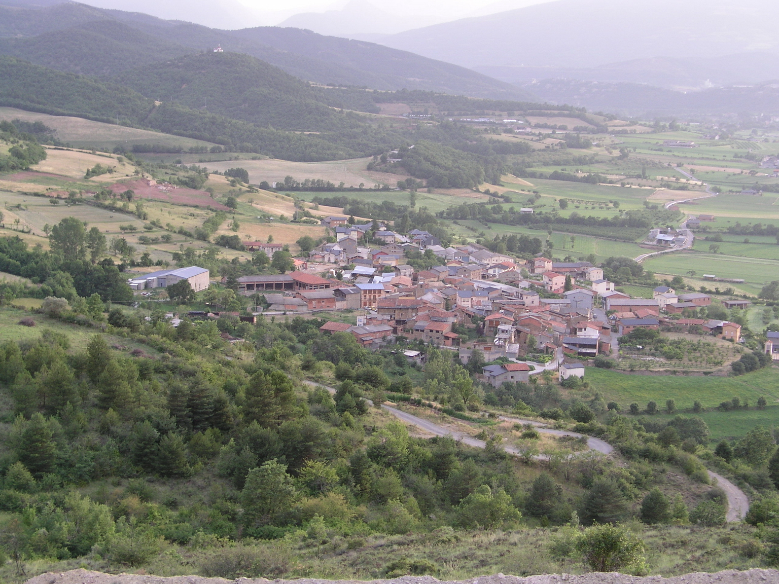 El poble d'Alàs